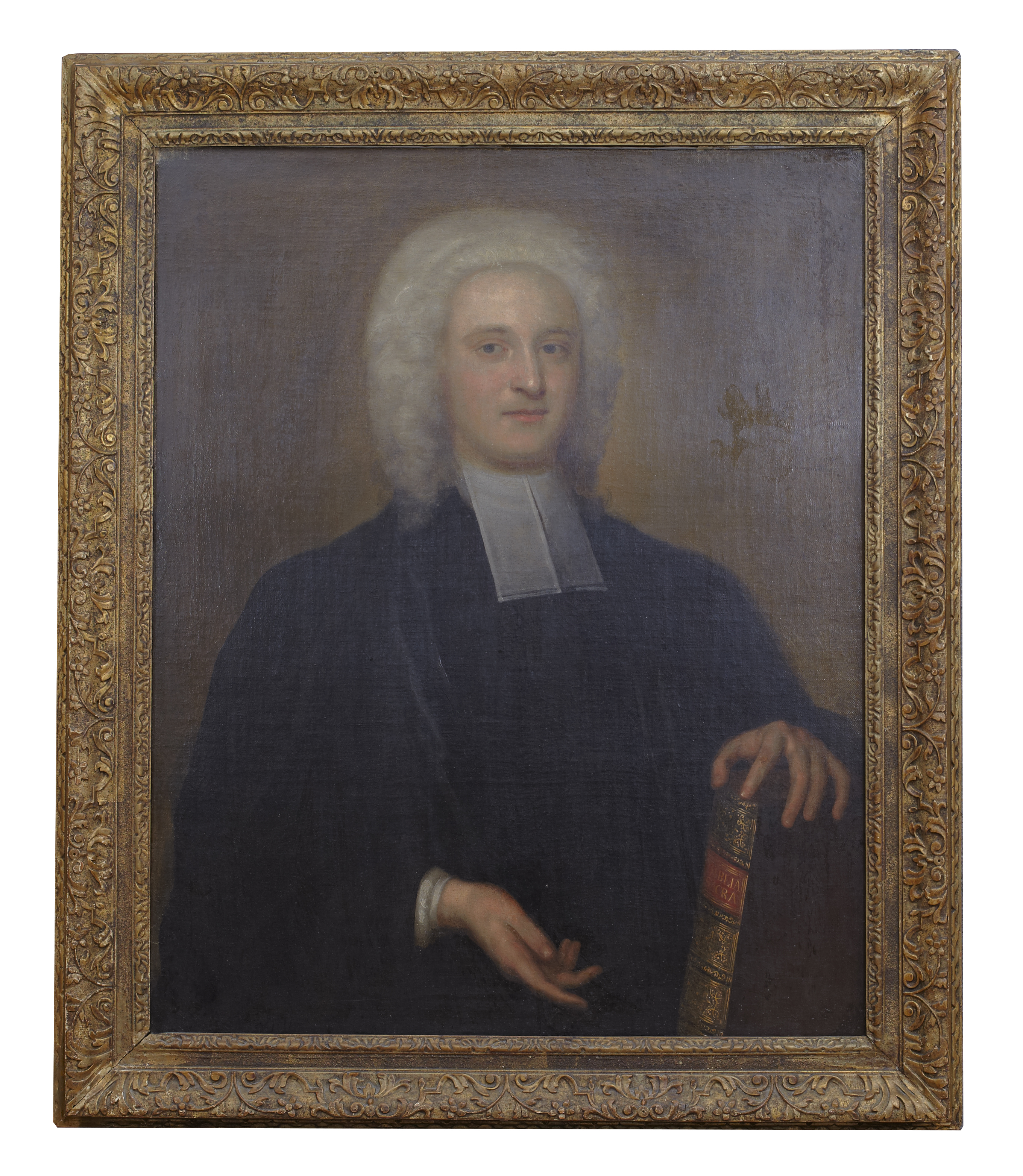 Porträtt föreställande kyrkoherden Axel Johan Lindblom (1713-1797) i Odensvi, Östergötland. Lindblom bär prästrock med elva om halsen. Hans vänstra hand vilar på bibeln. Målning av okänd ca 1750.